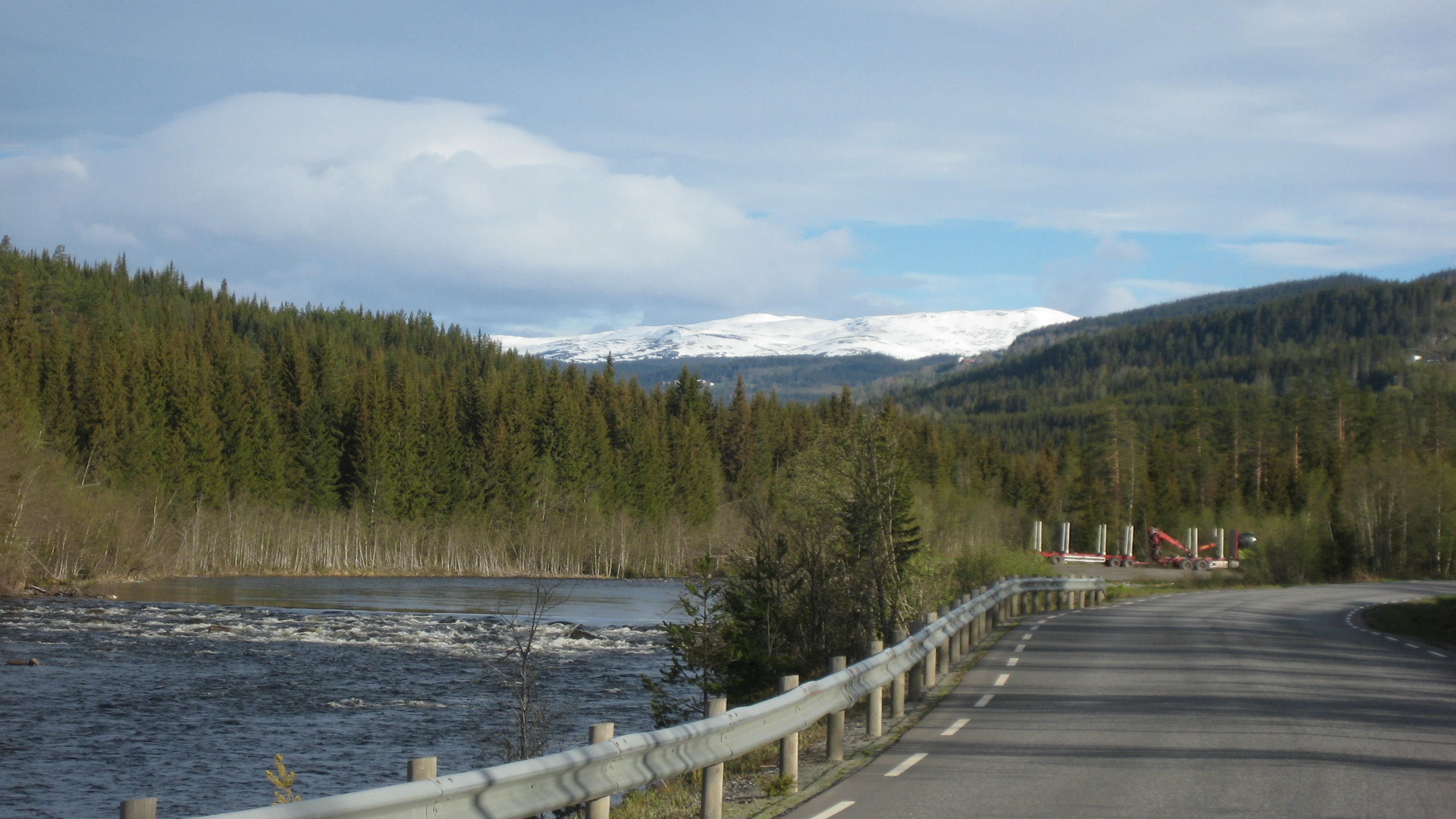 Synnfjellet sett fra fylkesvei 2424 (tidl. 186). Dokkaelva til venstre.